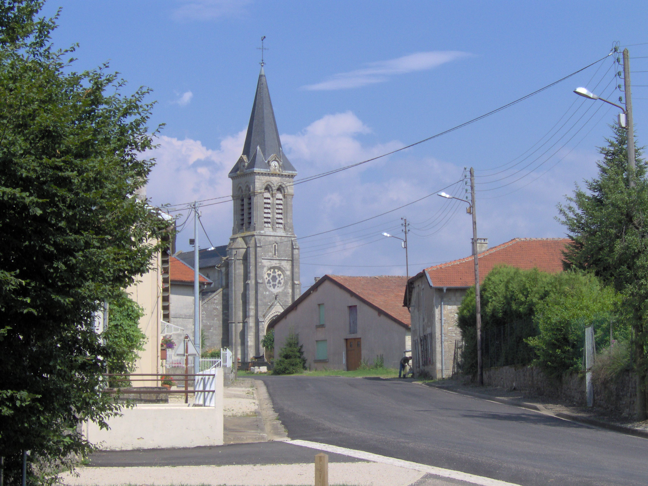 Vue de l'église de Fouchères-aux-Bois, Dans le département de la Meuse, France.